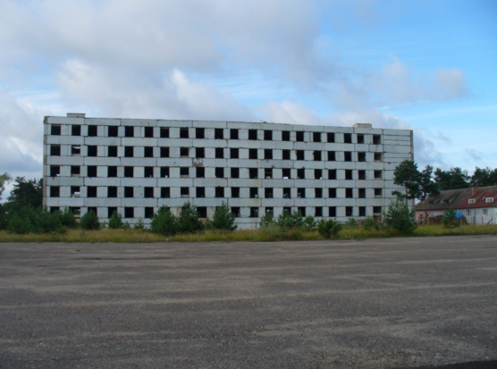 Kłomino w okolicy Bornego Sulinowa[1]